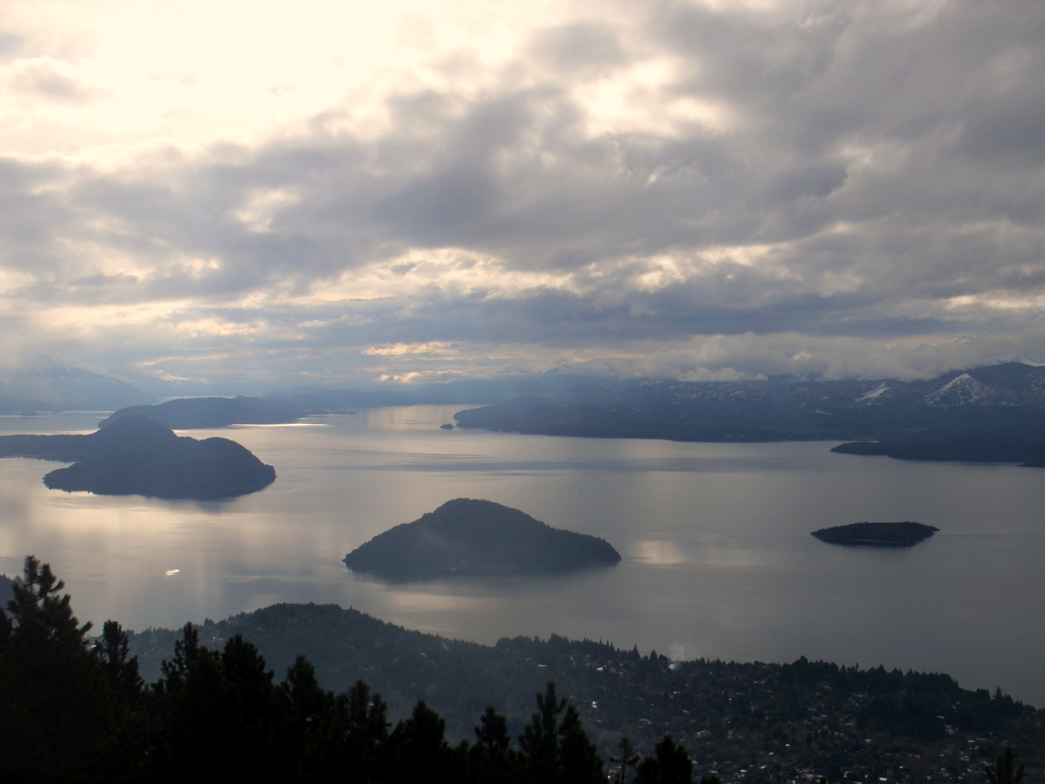 La isla Huemul en el centro del lago con el islote contiguo Gallinas.